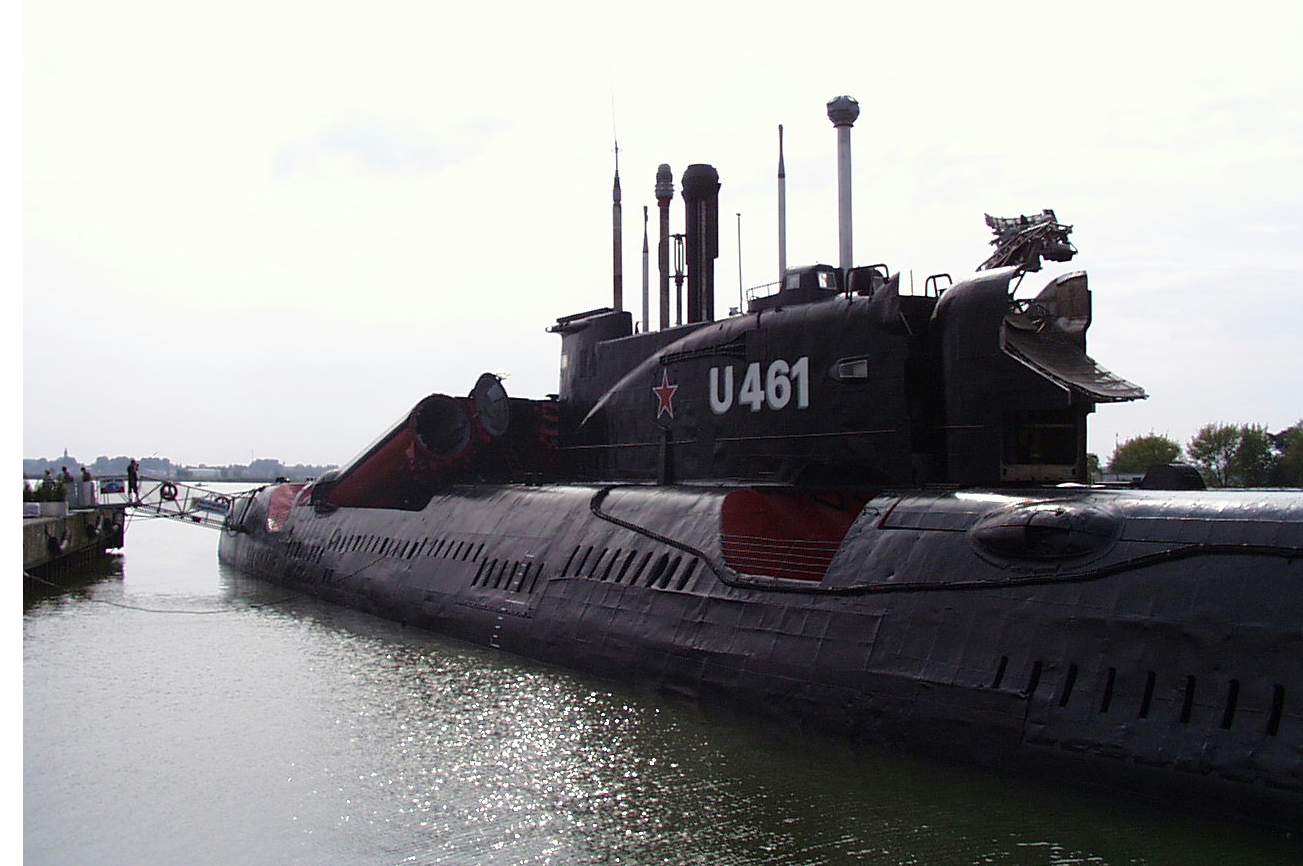 Das U-Boot von der Seite